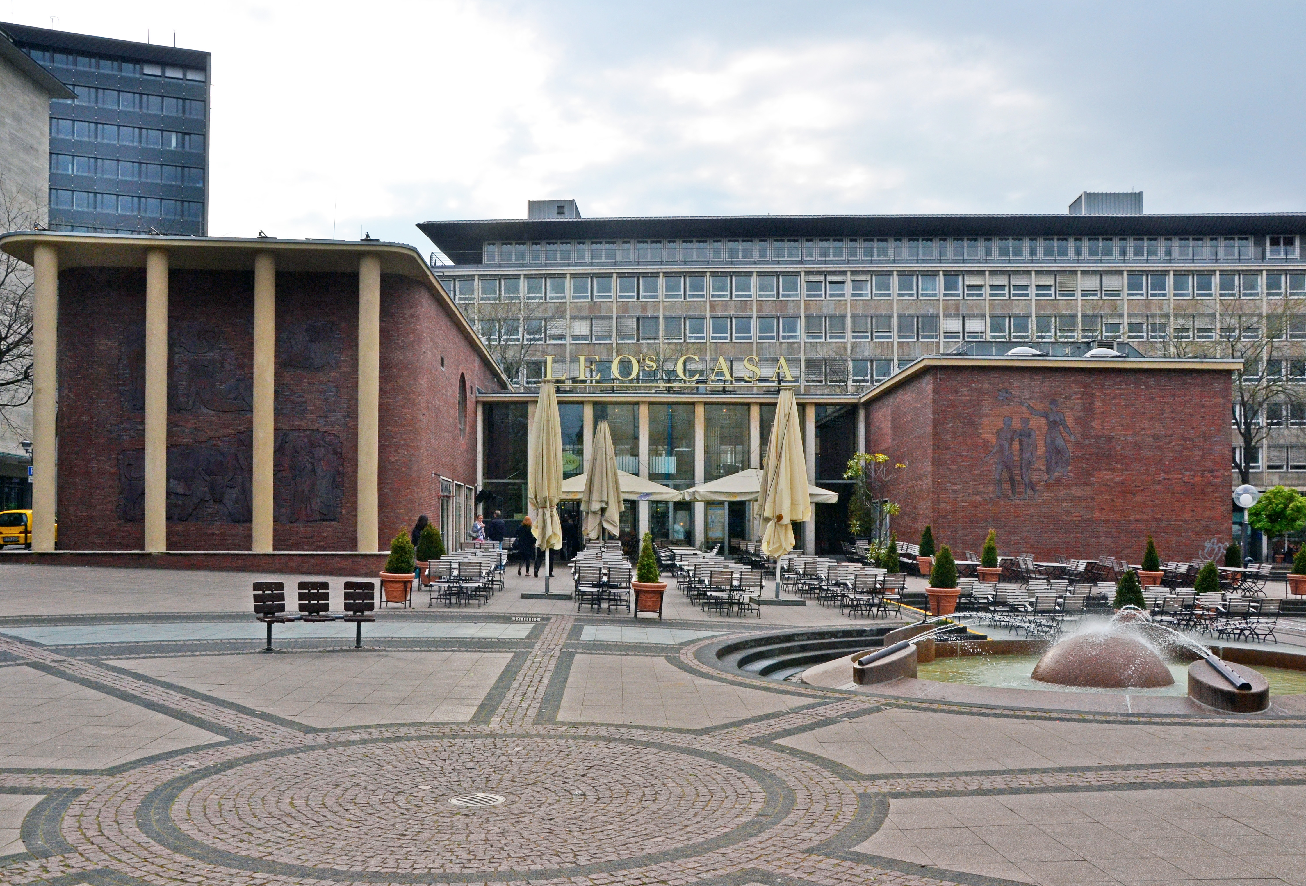 Kennedyplatz in Essen-Stadtkern, ehem. Amerikahaus Ruhr, heute Europahaus mit Straatmann´s Theater (Reliefs von Herbert Lungwitz)